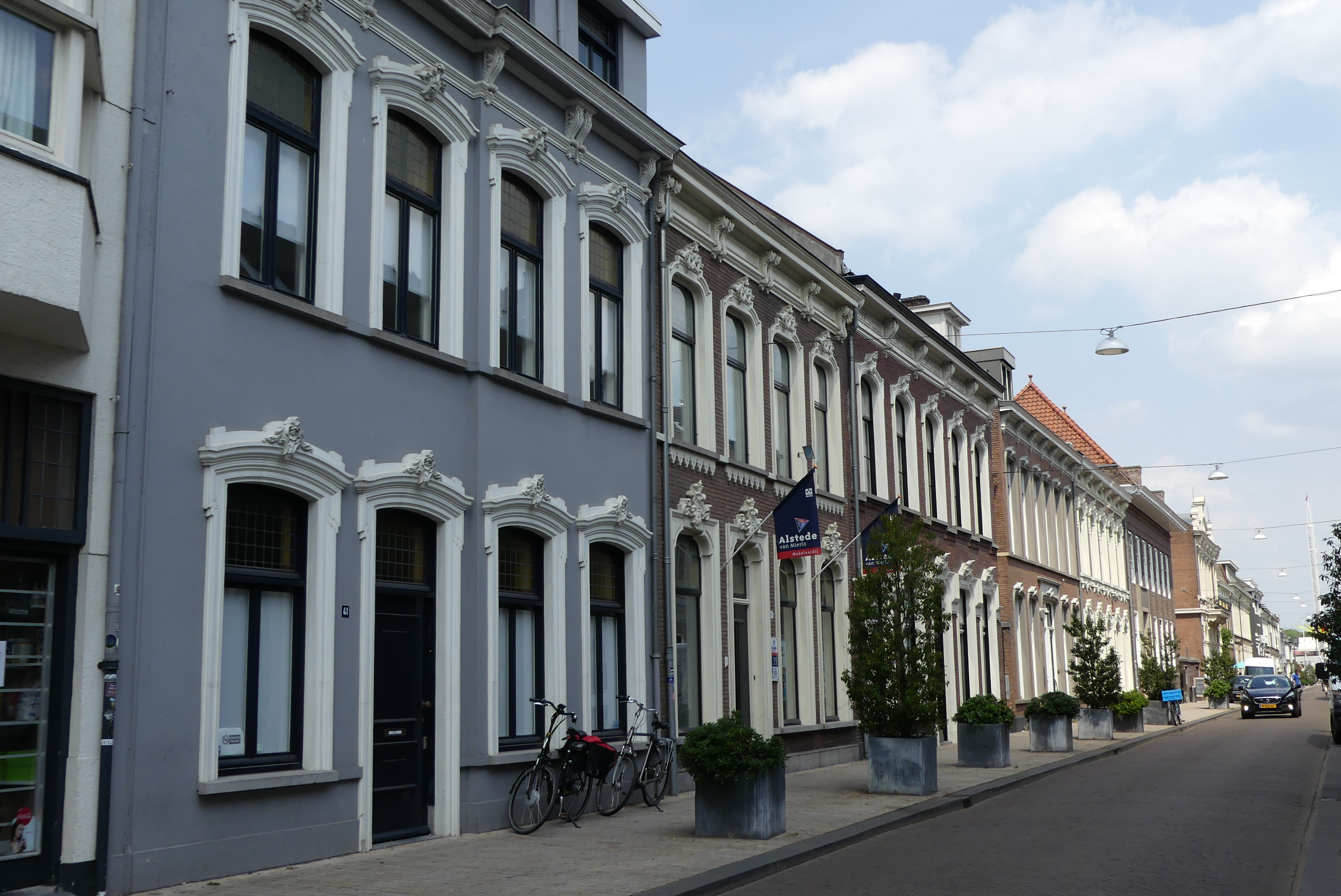 Zicht op de straat de Willem II Straat gelegen in het centrum van Tilburg. Niet ver van Centraal Station Tilburg